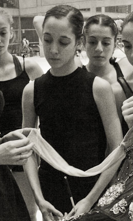 La gimnasta rítmica Isabel Pagán junto a otras componentes del conjunto nacional durante un entrenamiento en el CAR de Madrid en diciembre de 2003.